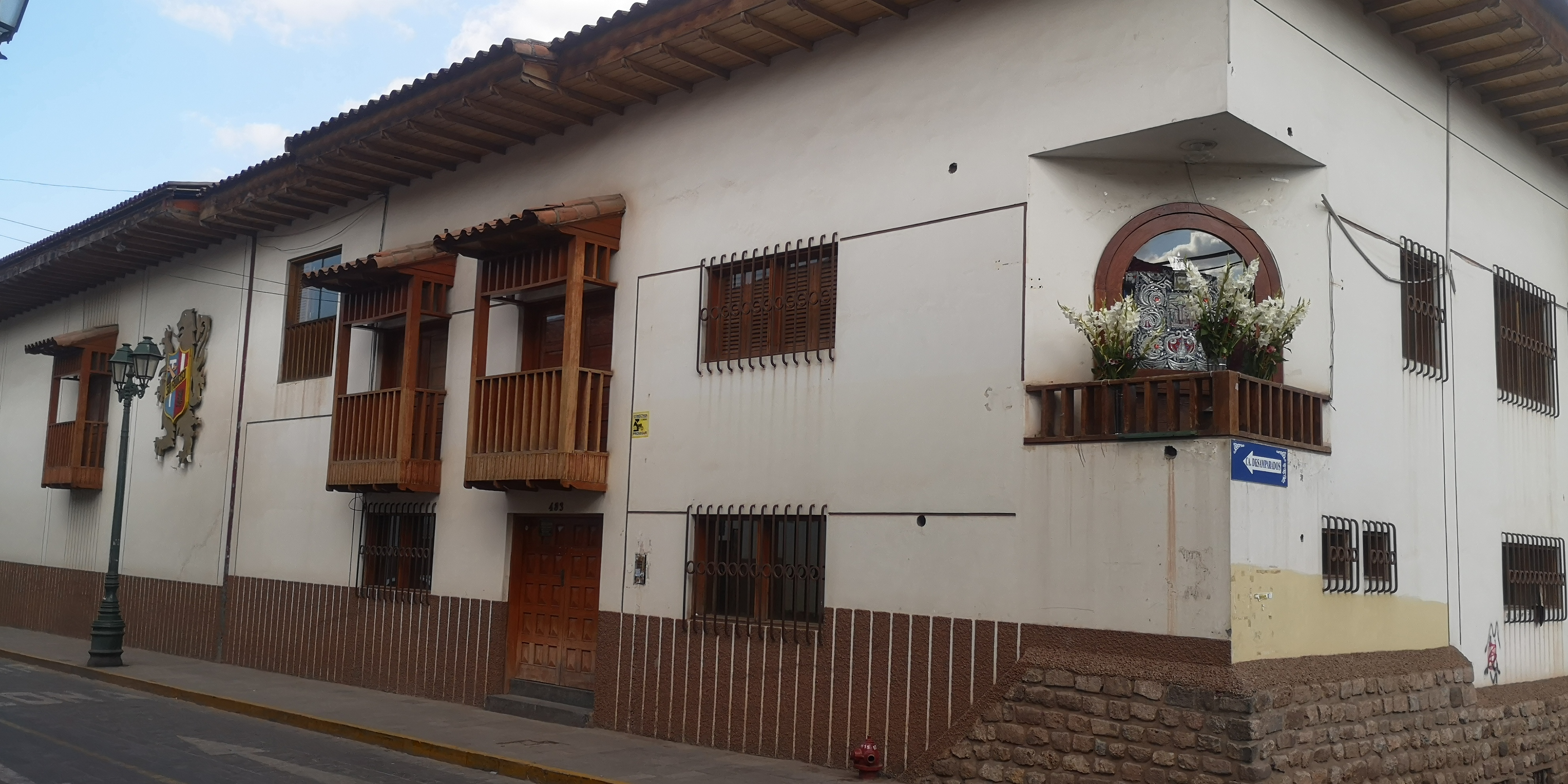 Frontis del Colegio San Francisco de Asís del Cusco, Perú.